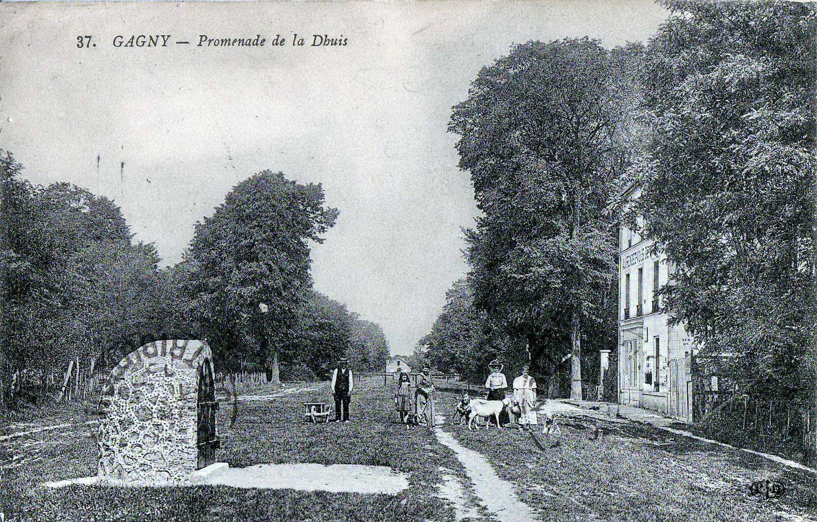 Carte postale ancienne éditée par ELD, N°37 GAGNY : Promenade de la Dhuys (sur l'Acqueduc de la Dhuis)